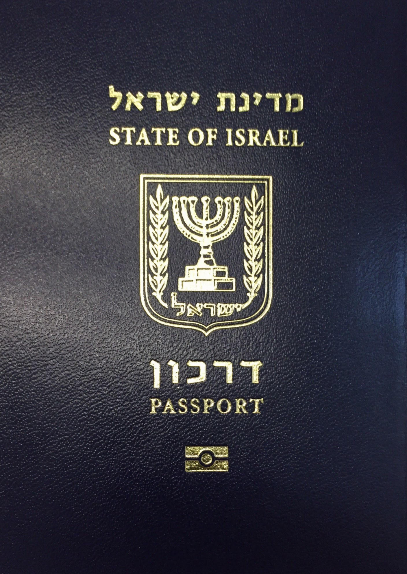 דרכון ישראלי (ביומטרי)